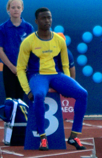 Emil von Barth laddar för finalen på 100 meter vid JEM 2015.